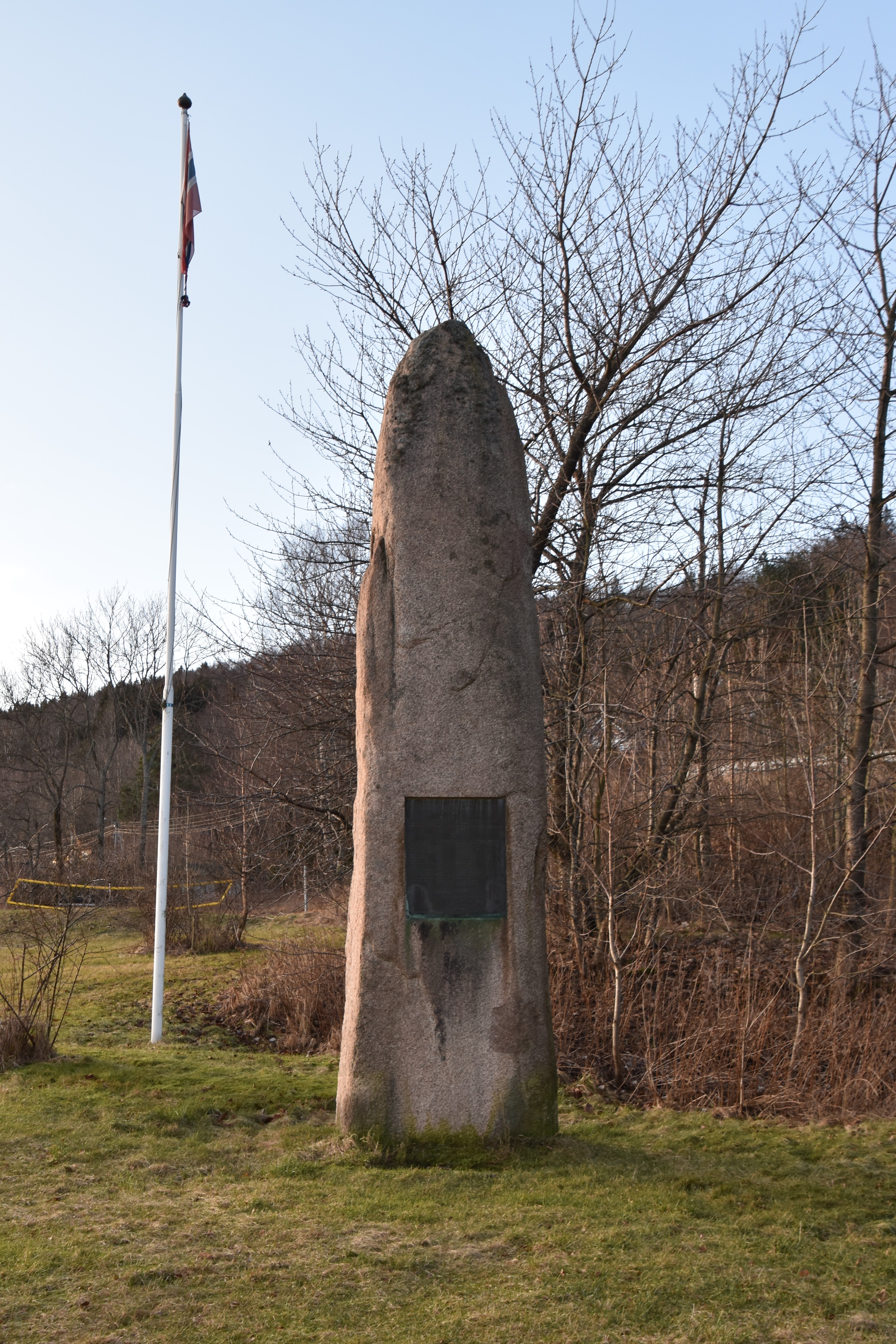 Minnesmerke over Hurum-ulykken (1949) reist 1989